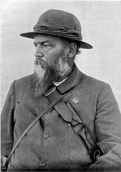 Lucas Meyer, Boer Géeneral